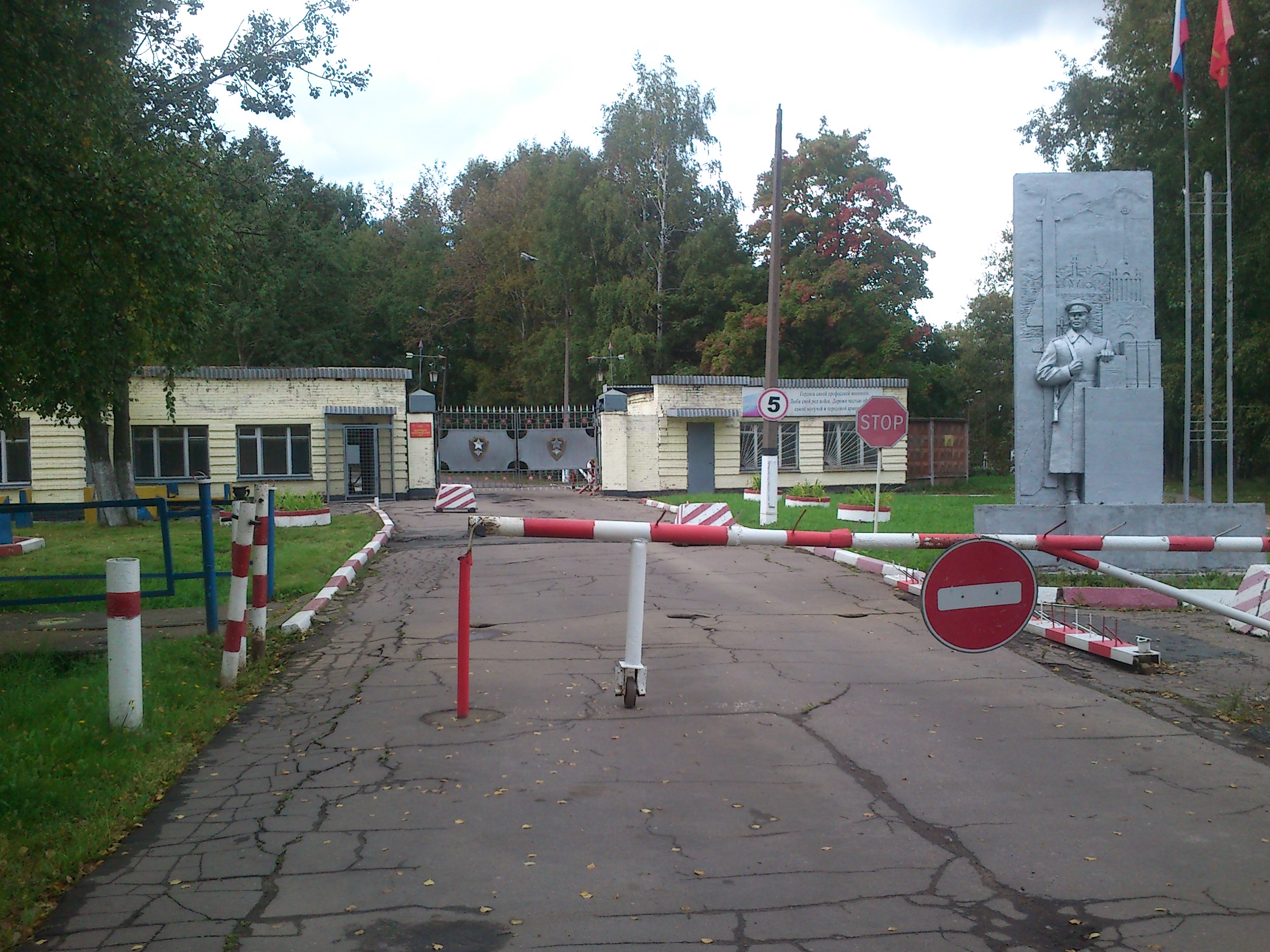 КПП №1 СПВВУРЭ (ВИ)